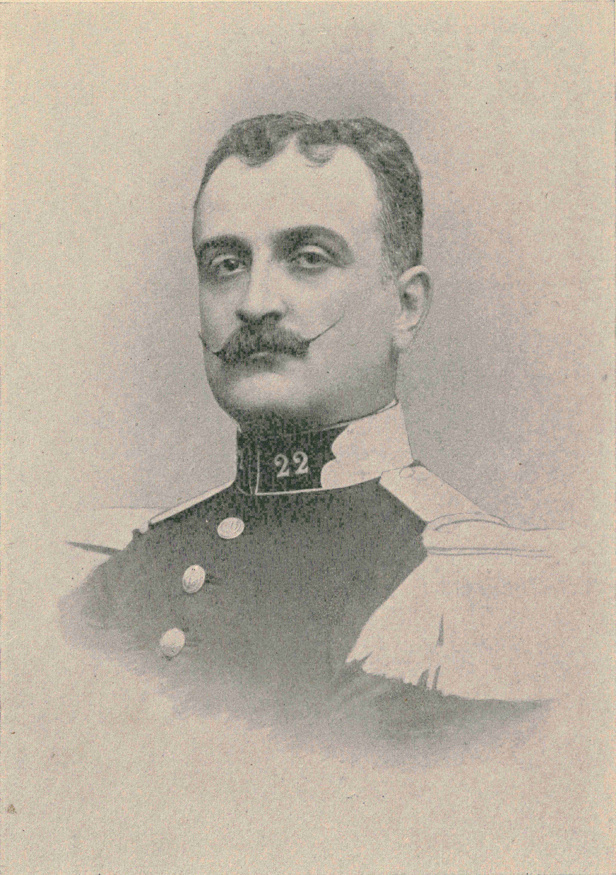 Antoine-Amédée-Marie-Vincent Manca-Amat de Vallombrosa , Marquis de Morès, (1858 - 1896), son portrait.